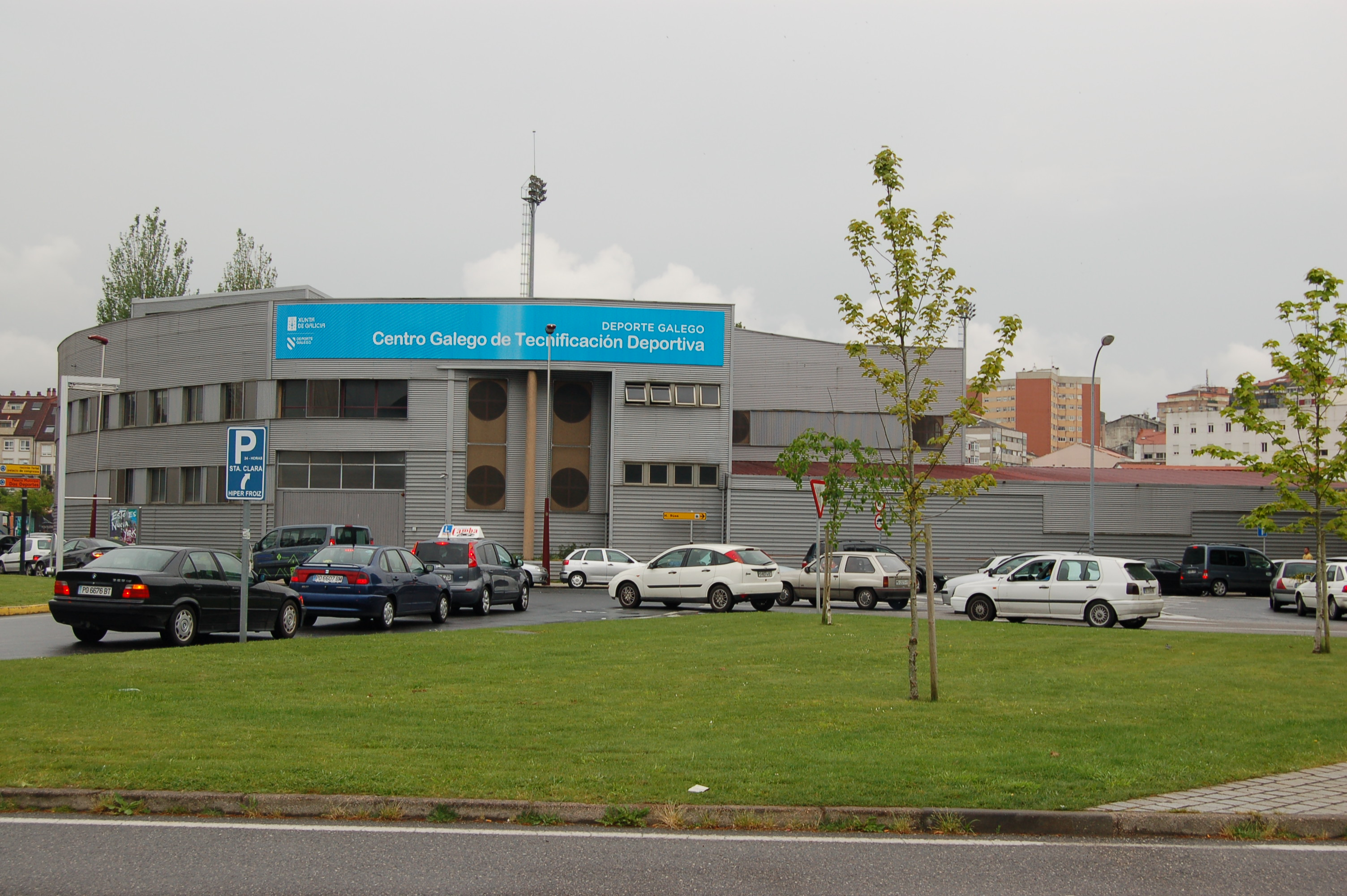 Vista exterior do Centro Galego de Tecnificación Deportiva, en Pontevedra.